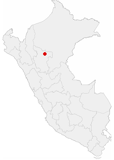 Ubicacion de la Ciudad de Tarapoto